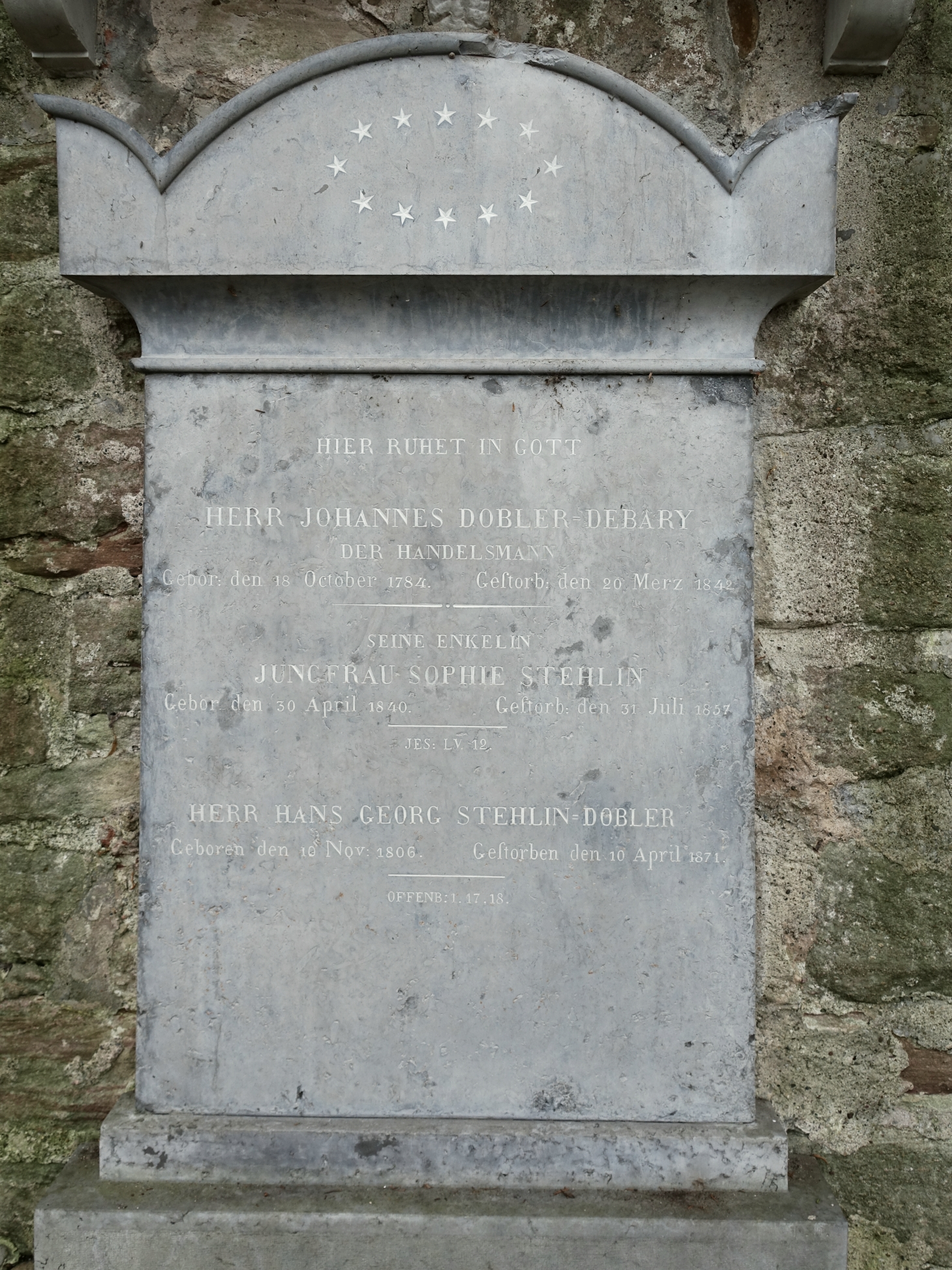 Familien Grab auf dem St. Alban-Kirchhof in Basel von Hans Georg Stehlin-Dobler (1806–1871) Unternehmer